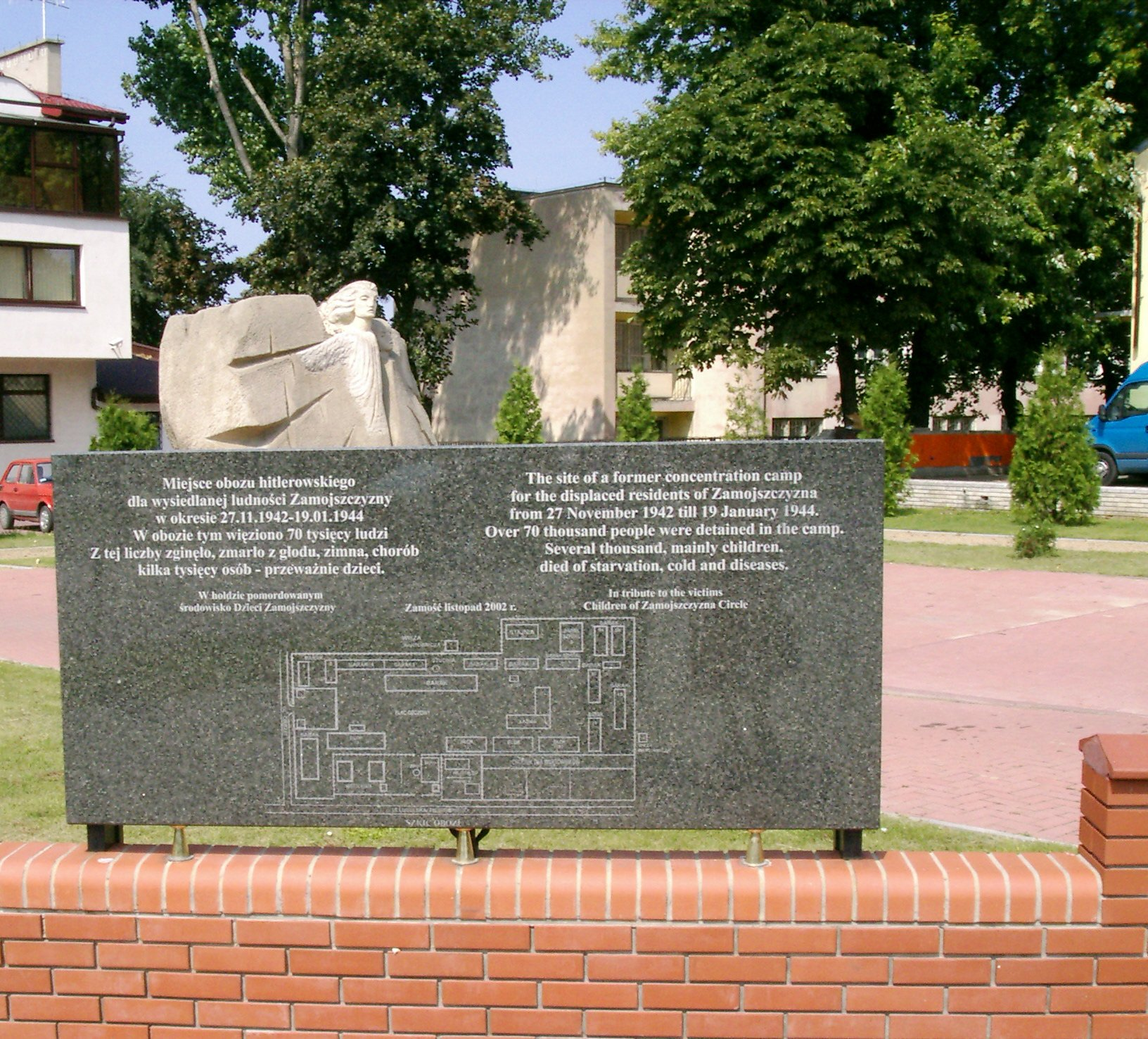 Tablica pamiątkowa na miejscu obozu przejściowego w Zamościu przy ul. Okrzei